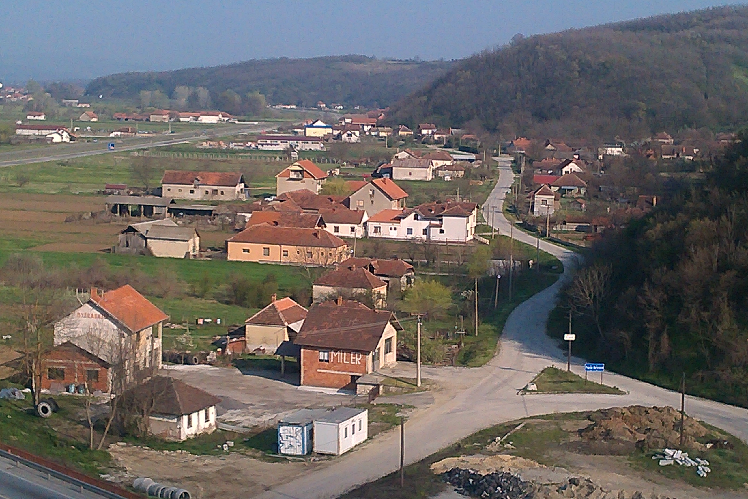 Srpski (latinica): Pogled na Gonju Batočinu